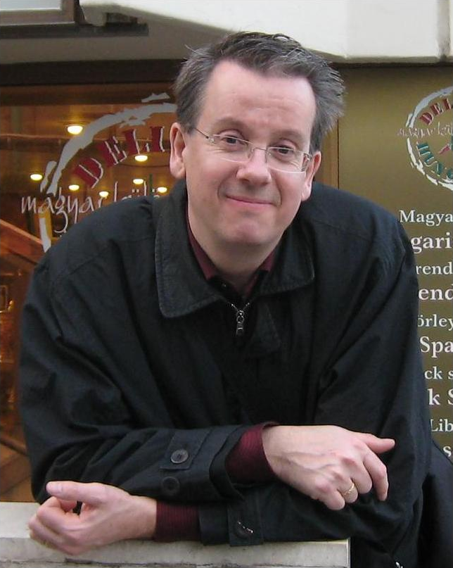 Richard Tellström